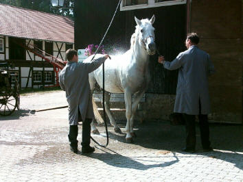 Pferdepflege auf dem Haupt- und Landgestüt Marbach, selbst fotografiert, 2005 (Der Württemberger Prämienhengst "Wanilo" vor dem Stall der Landesfahrschule)